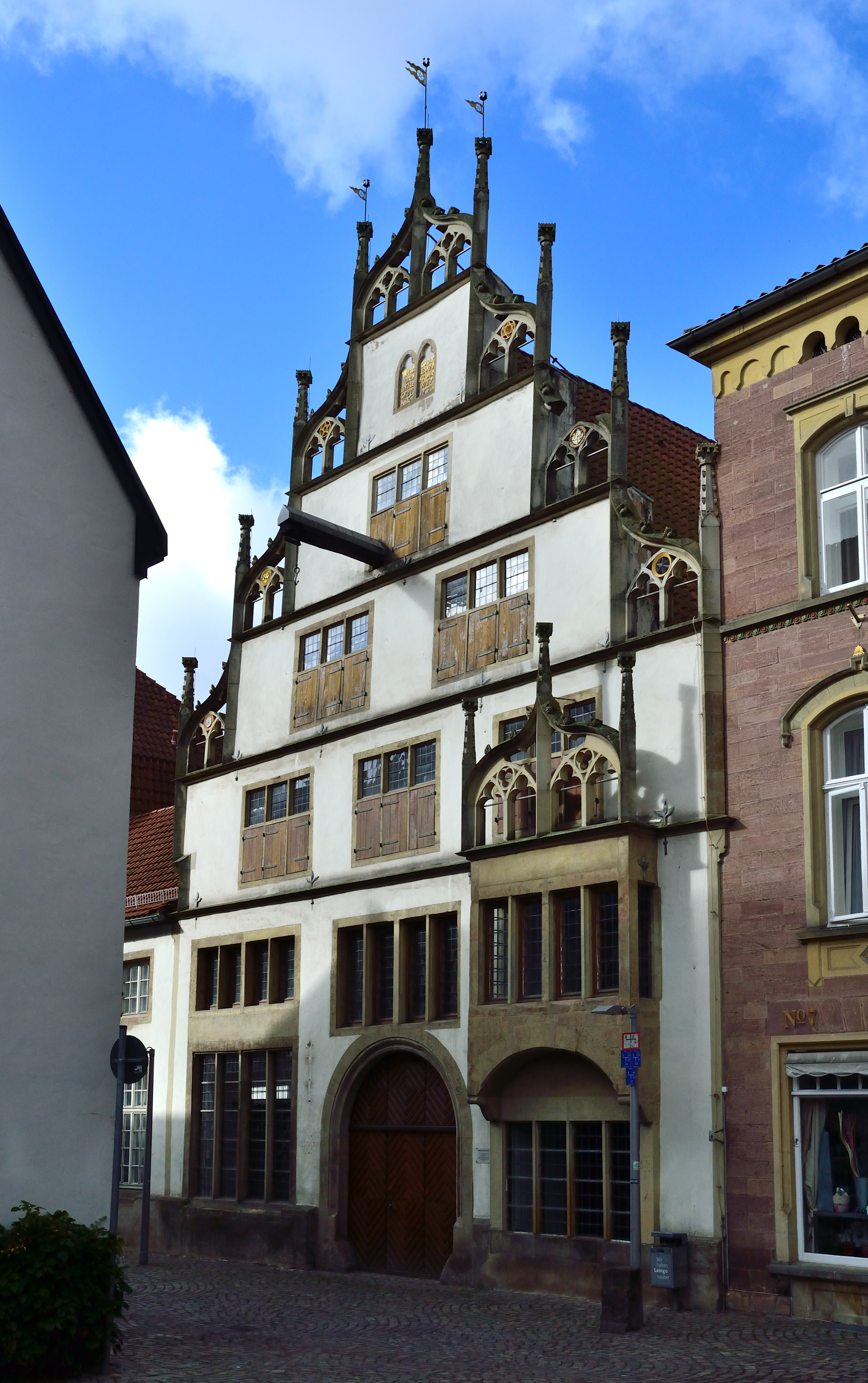 This is a photograph of an architectural monument.It is on the list of cultural monuments of Lemgo Wippermansches Haus